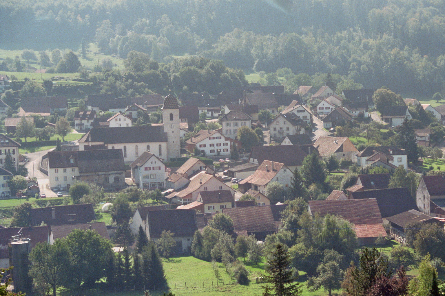 village paisible de Haute-Ajoie